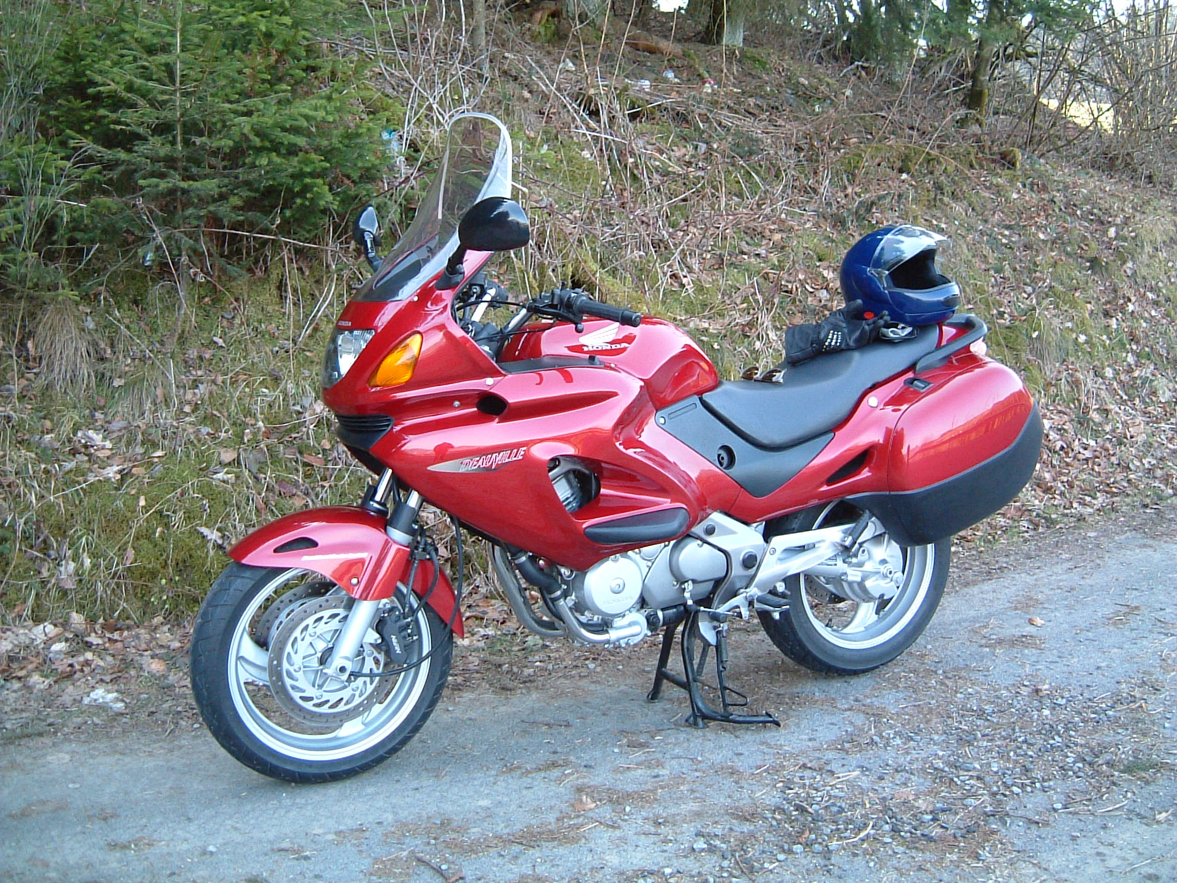 Motorrad Honda Deauville Modell 2003